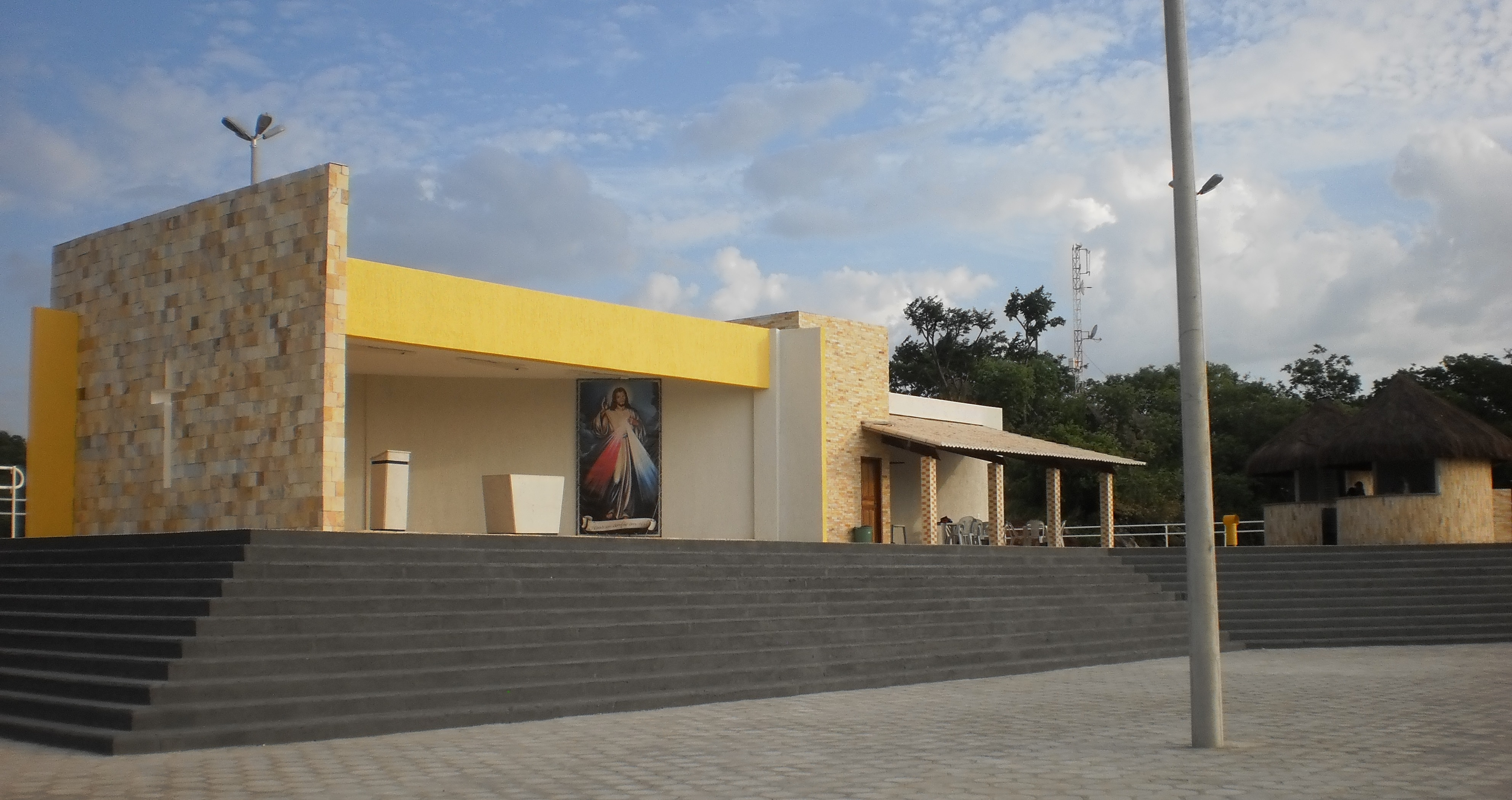 Vista parcial do complexo turístico do Santuário de São João Batista, no serrote homônimo Encanto, Rio Grande do Norte, Brasil.